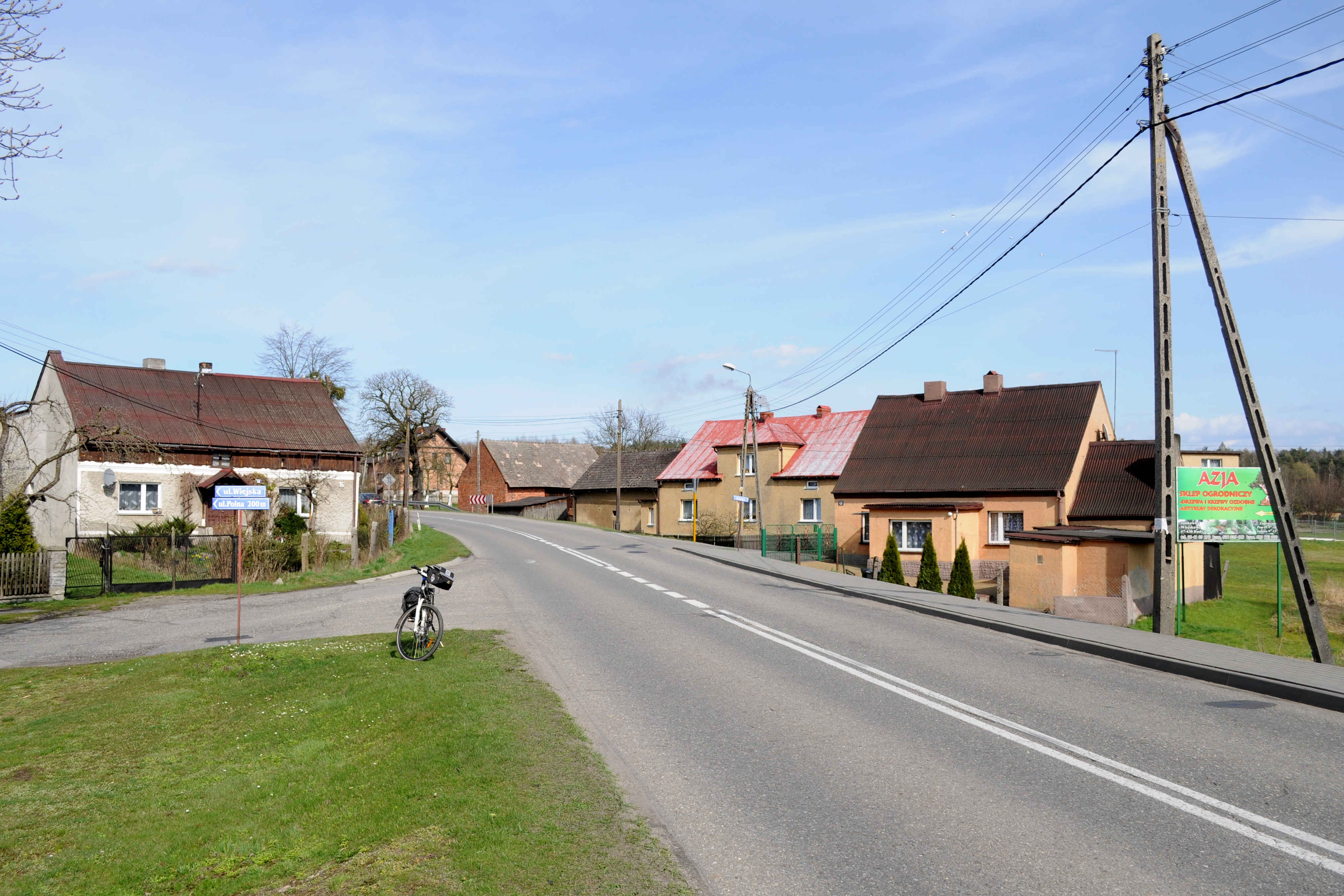 Jankowice